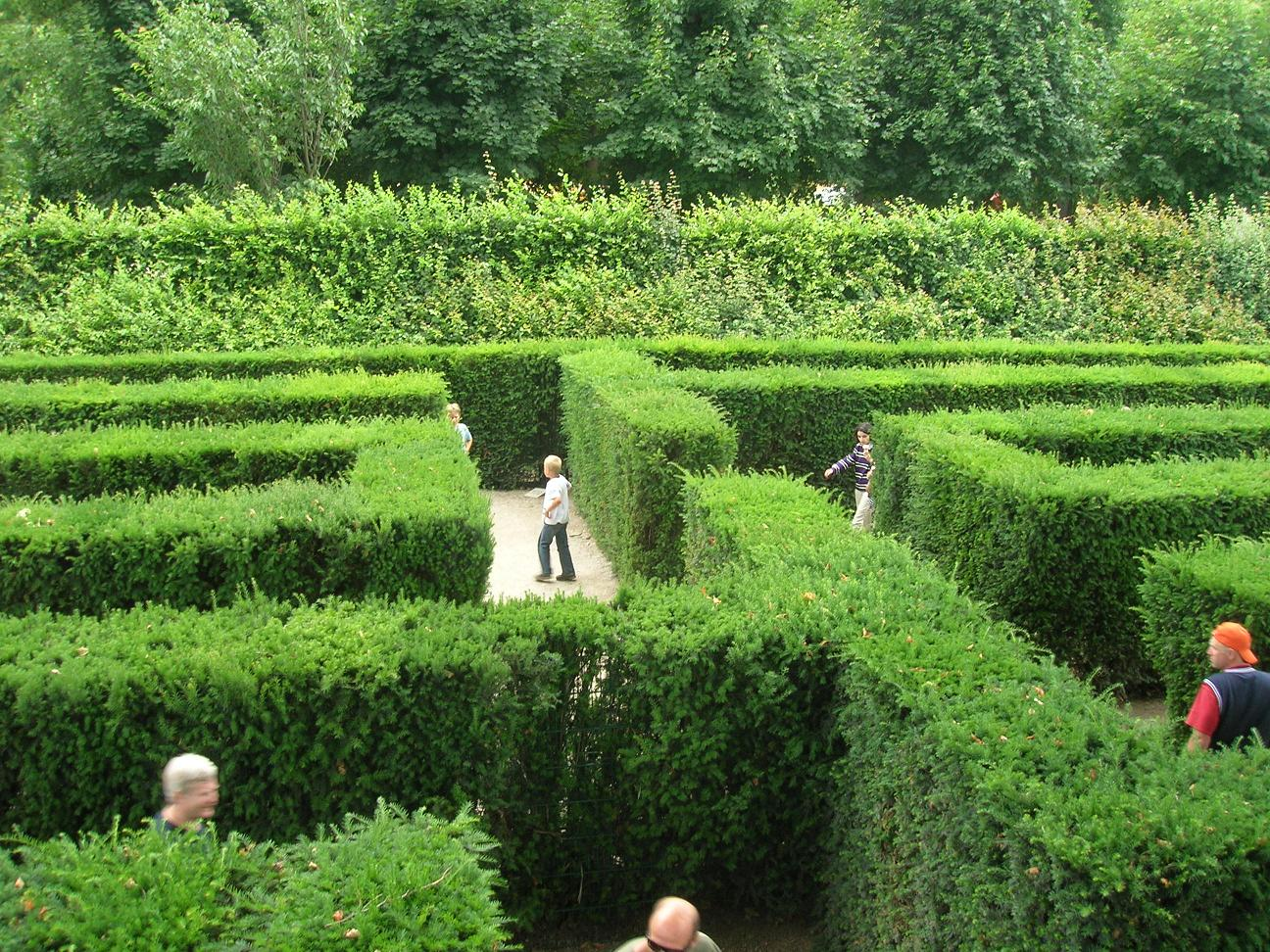 Maze/Labyrinth Schönbrunn